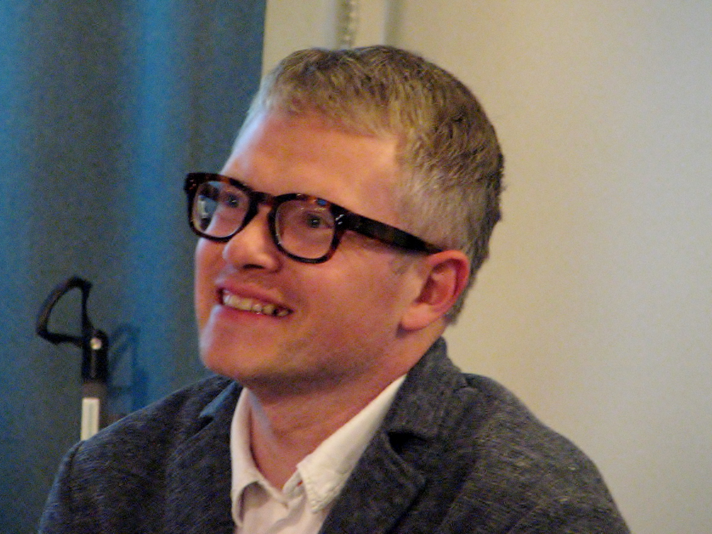 Janek Mäggi esinemas kirjandusfestivali HeadRead raames Tallinna kirjanike maja musta laega saalis